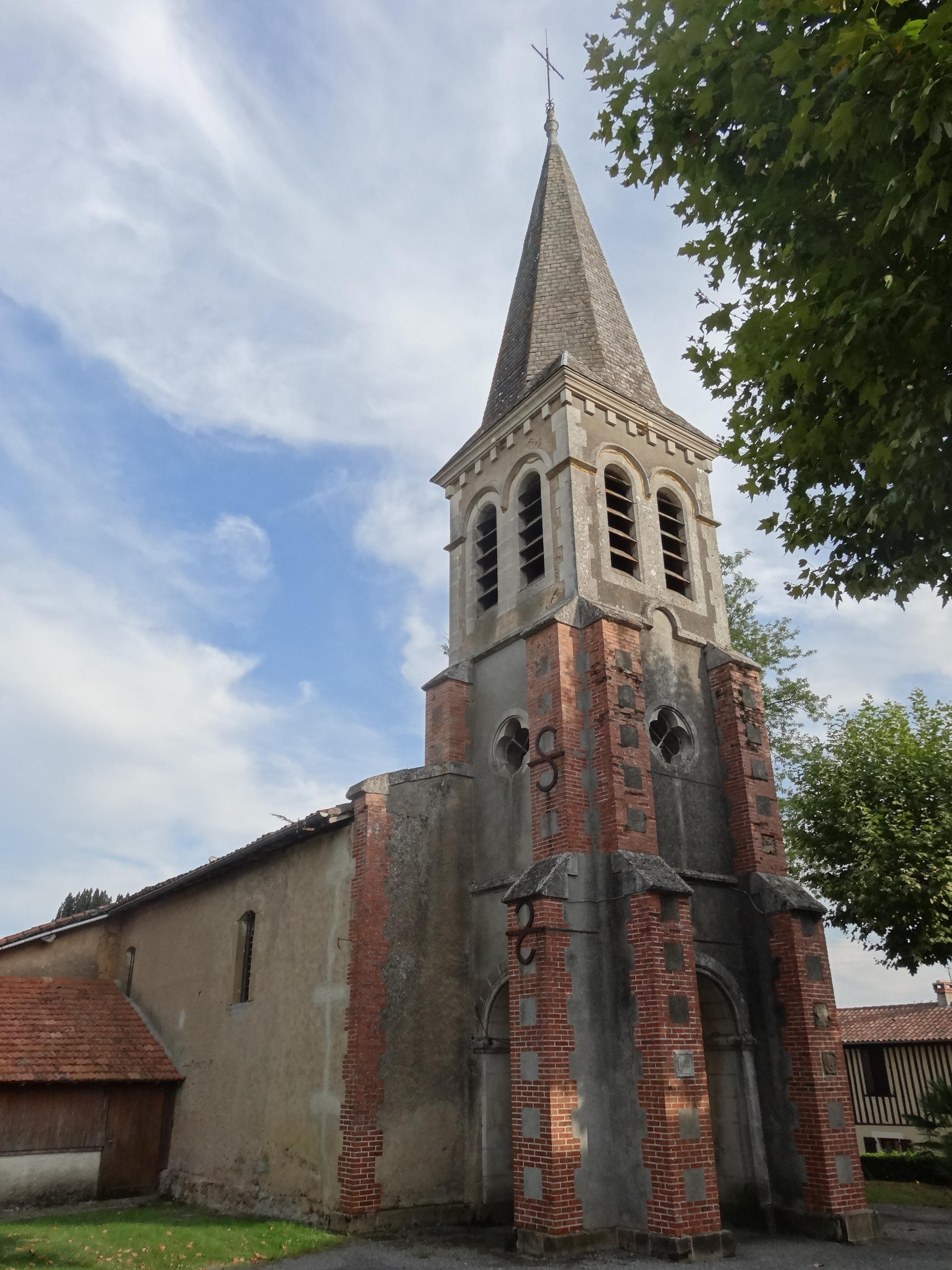 L'église de Monlaur-Bernet